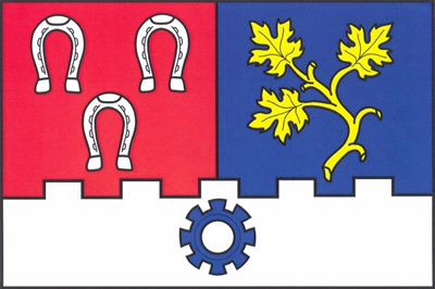 Oficiální vlajka města Hostivice